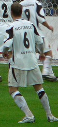 Lukas Nottbeck (Das Foto wurde von Mdiet bearbeitet)